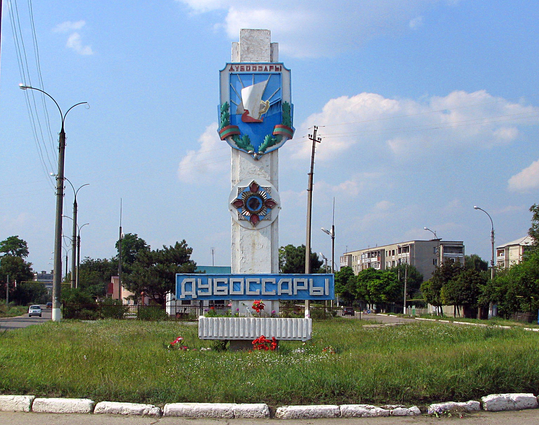 Герб города Дубосссары